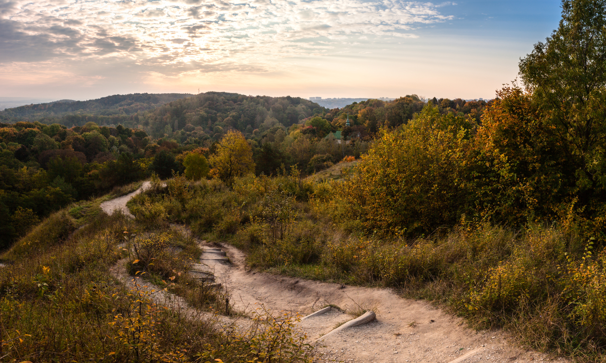 Знесіння, м. Львів, вул. Новознесенська, 32